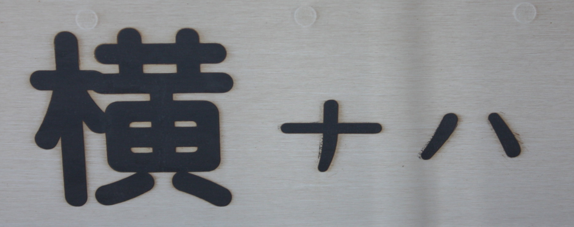 横ナハ所属表記